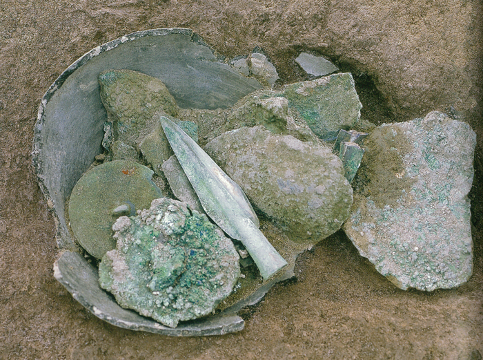 Urnenfelderzeitliches Metalldepot der archäologischen Großgrabung Rannersdorf 2001/2002